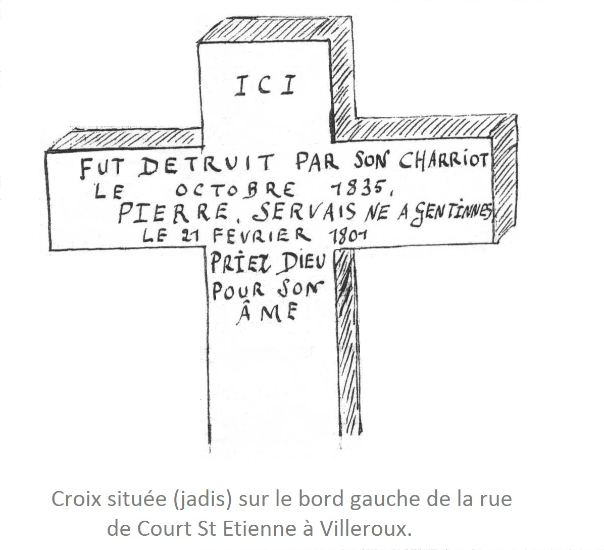 Cénotaphe à Pierre Servais (1801-1835) né à Gentinnes, décédé à Villeroux. Accident de charette sur la rue de Court St Etienne à Villeroux. La Croix est/était située/enfouie sur la gauche en quittant Villeroux. (commune de Chastre, en Brabant Wallon). Belgique. Signalé dans "Histoire de la paroisse de Villeroux" de J. Nyssens. (polycopie à compte d'auteur, s-d. )